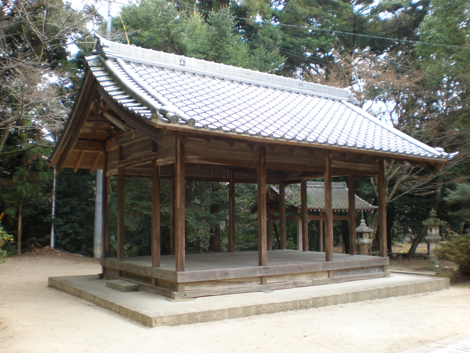 愛知県小牧市にある児神社の舞台